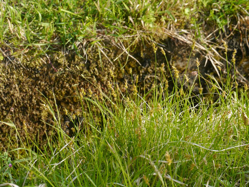 Carex arenicola：クロカワズスゲ 2018/04/25 三重県亀山市：Kameyama City, MIe Pref.